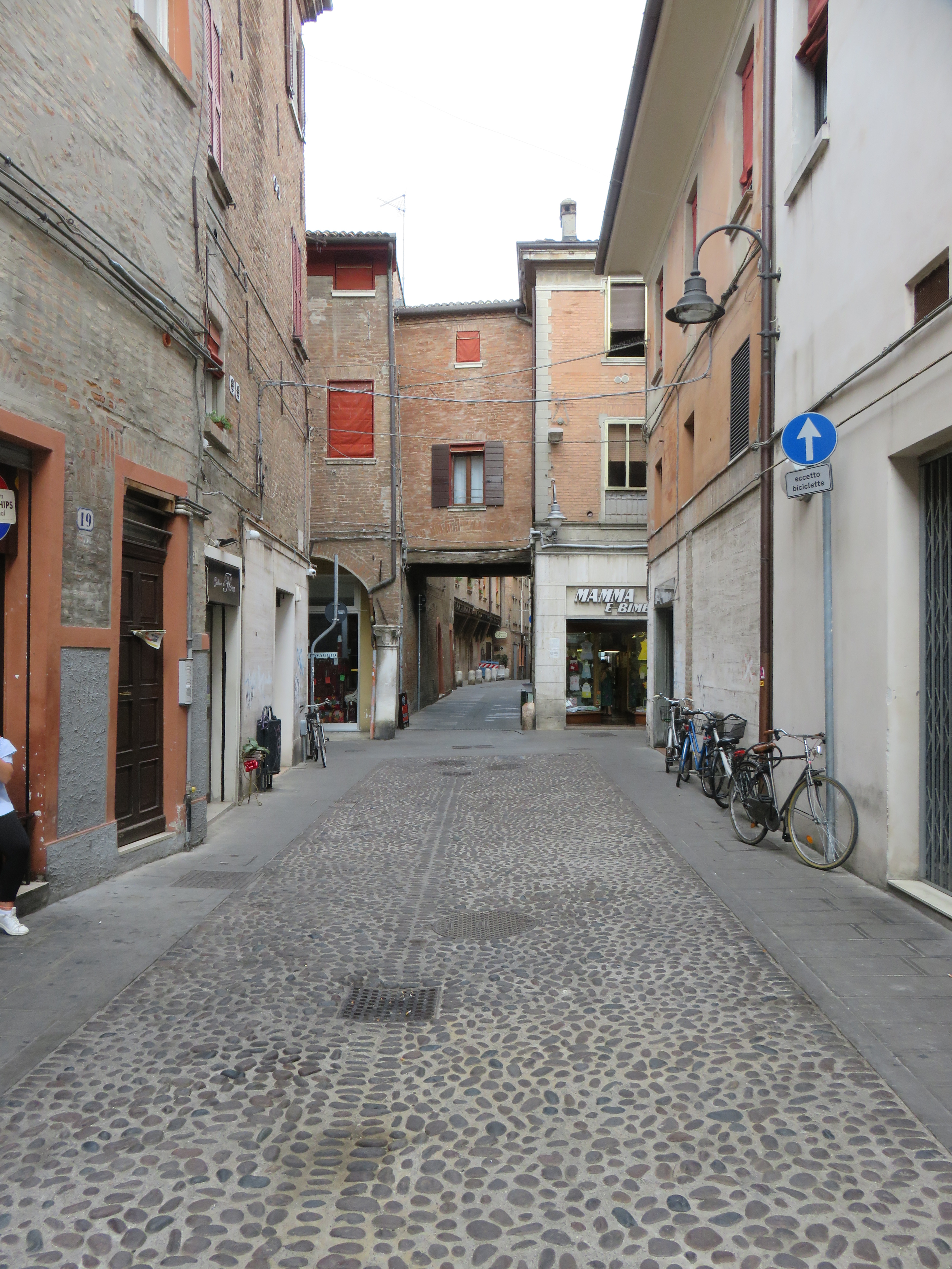 tratto compreso tra Porta Reno e San Romano